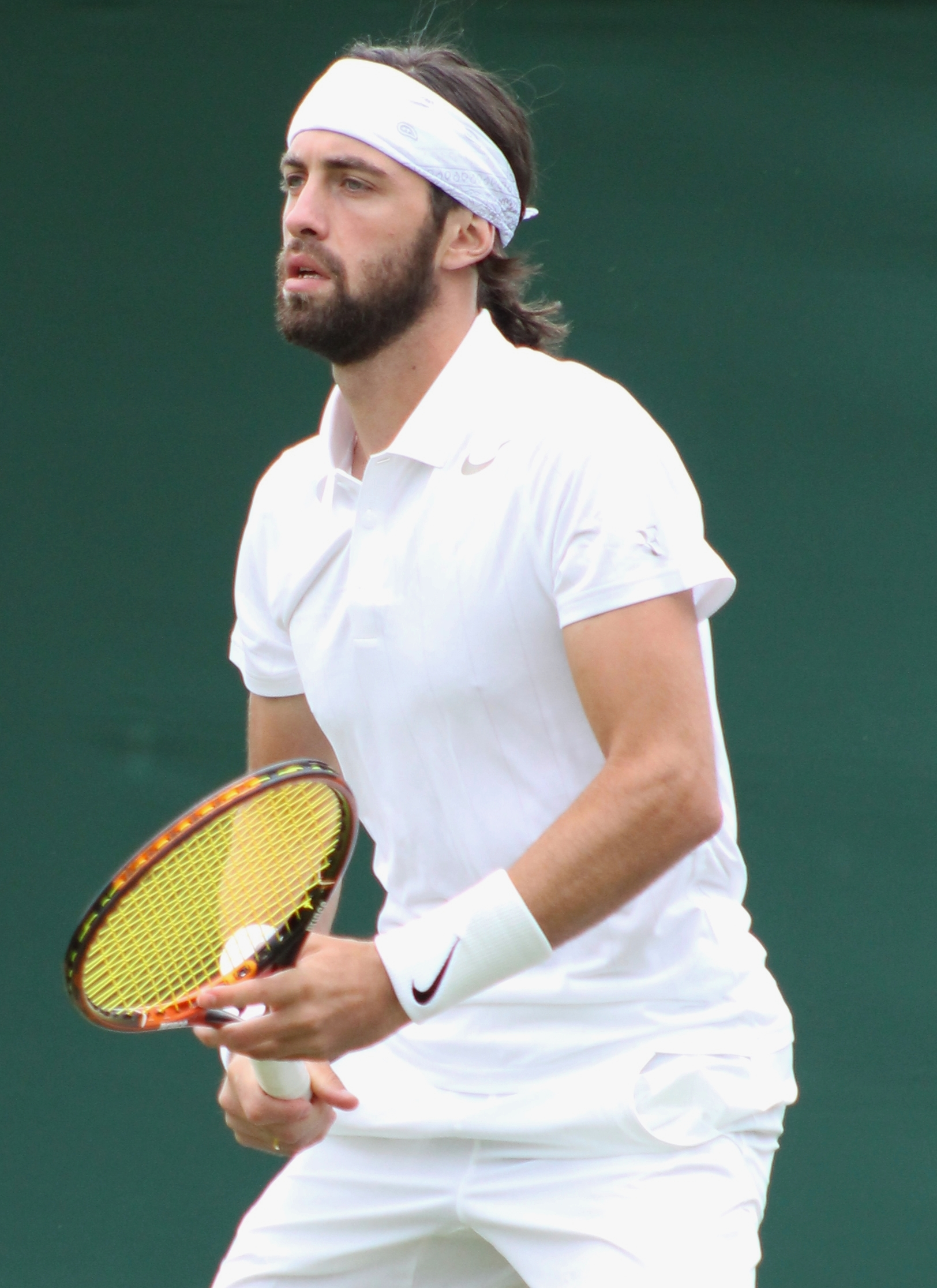 Basilashvili WMQ14 (8) (3)